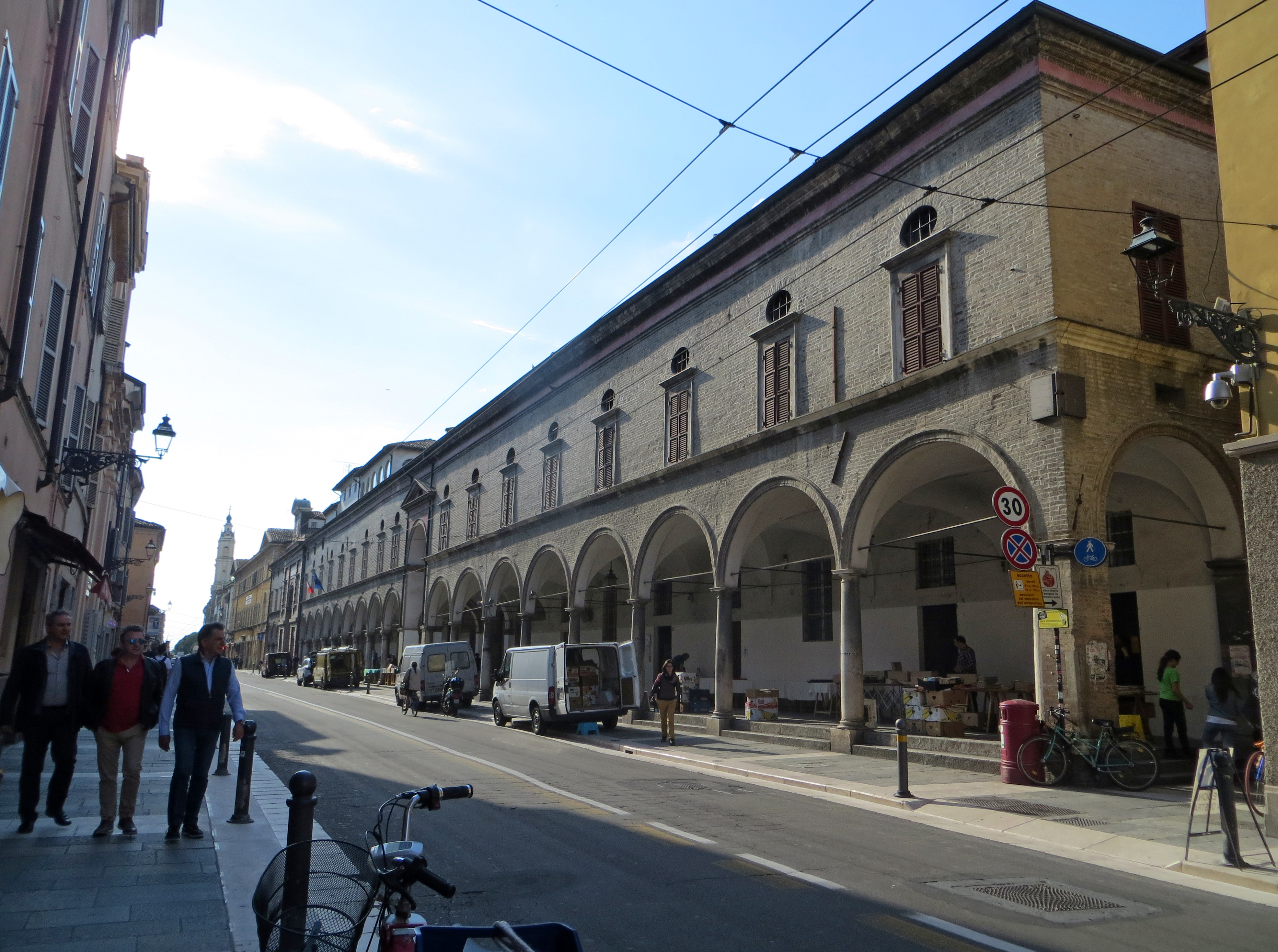 Ospedale Vecchio (Parma) - facciata